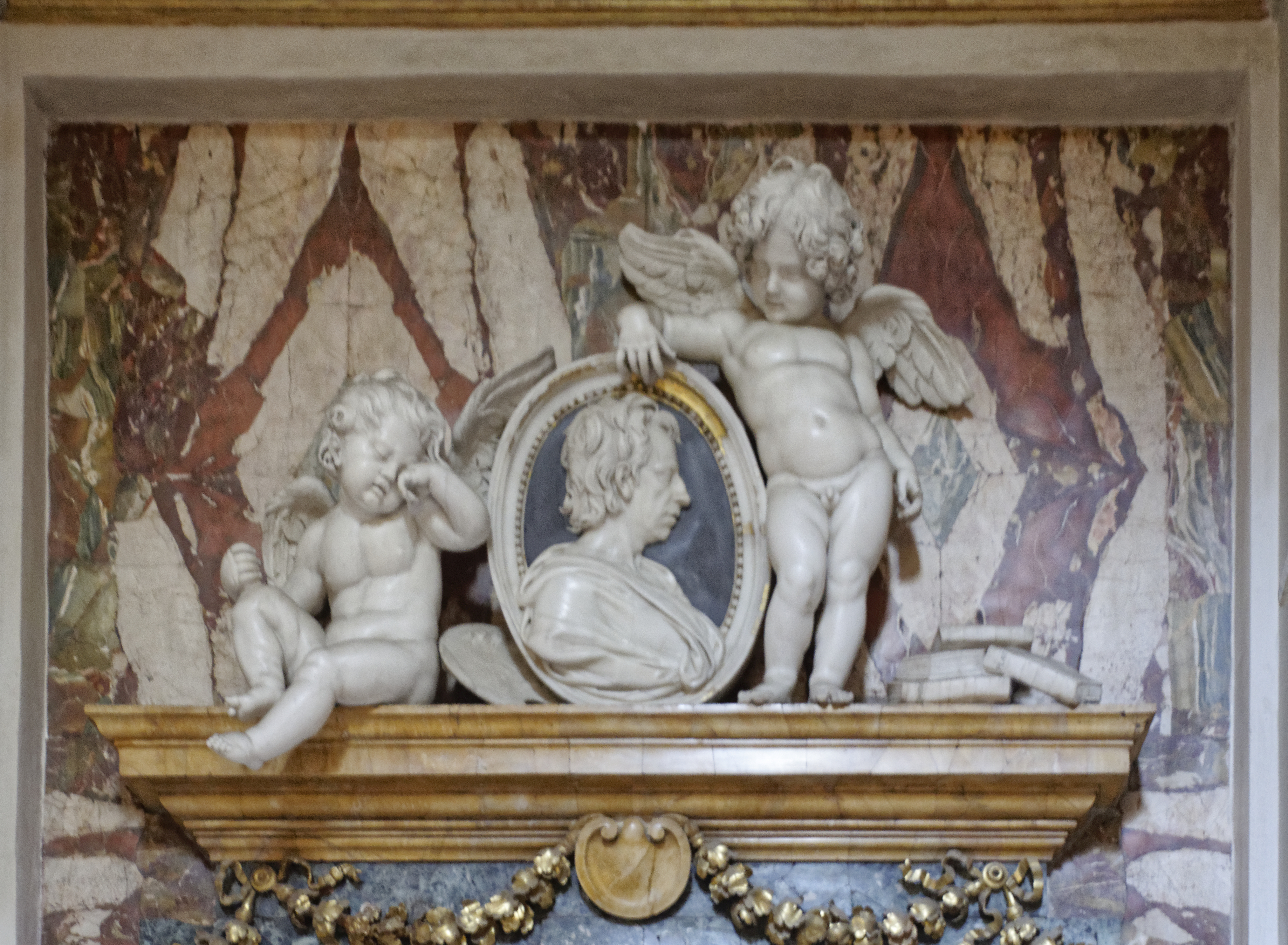 Santi Michele e Magno 2019 Dieses Foto entstand in Zusammenarbeit mit Stadtbesichtigungen.de Die Seiten Stadtbesichtigungen.de, der dazugehörige Reise Blog sowie die Facebookseite: Stadtbesichtigungen Rom dürfen dieses Bild für Ihre Veröffentlichungen ohne den Hinweis auf Wikipedia, Commons bzw der Lizenz verwenden. Die Verantwortlichen habe von mir (Ra Boe) die Originaldaten zur freien Verfügung übermittelt bekommen.